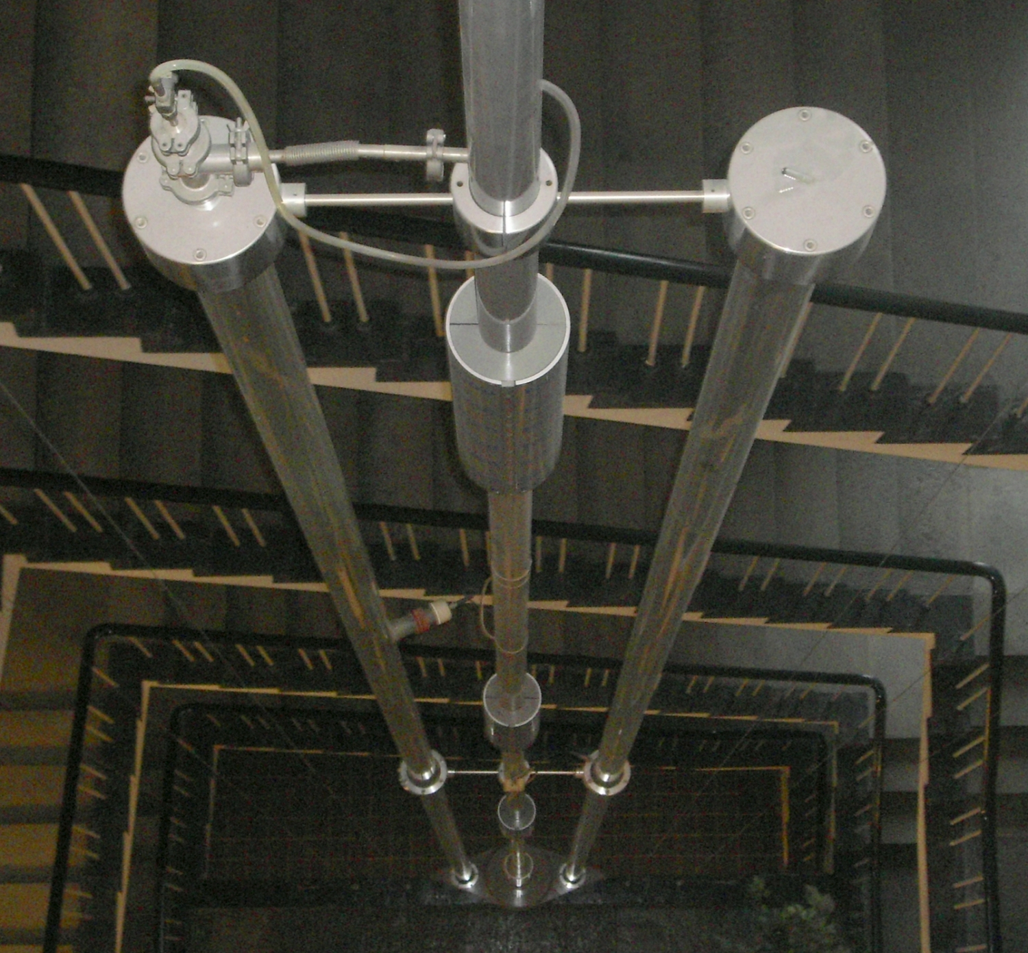 Watermoanometer in het gebouw van de Faculteit Technische Natuurwetenschappen van de Technische Universiteit in Delft, afb. 1